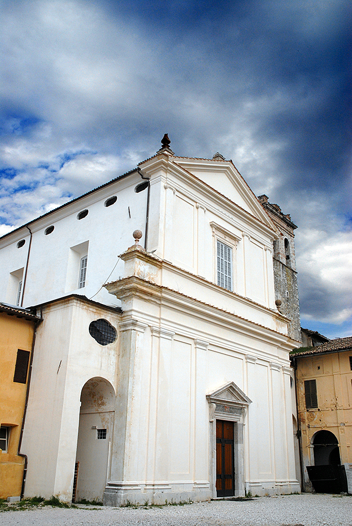 esterno